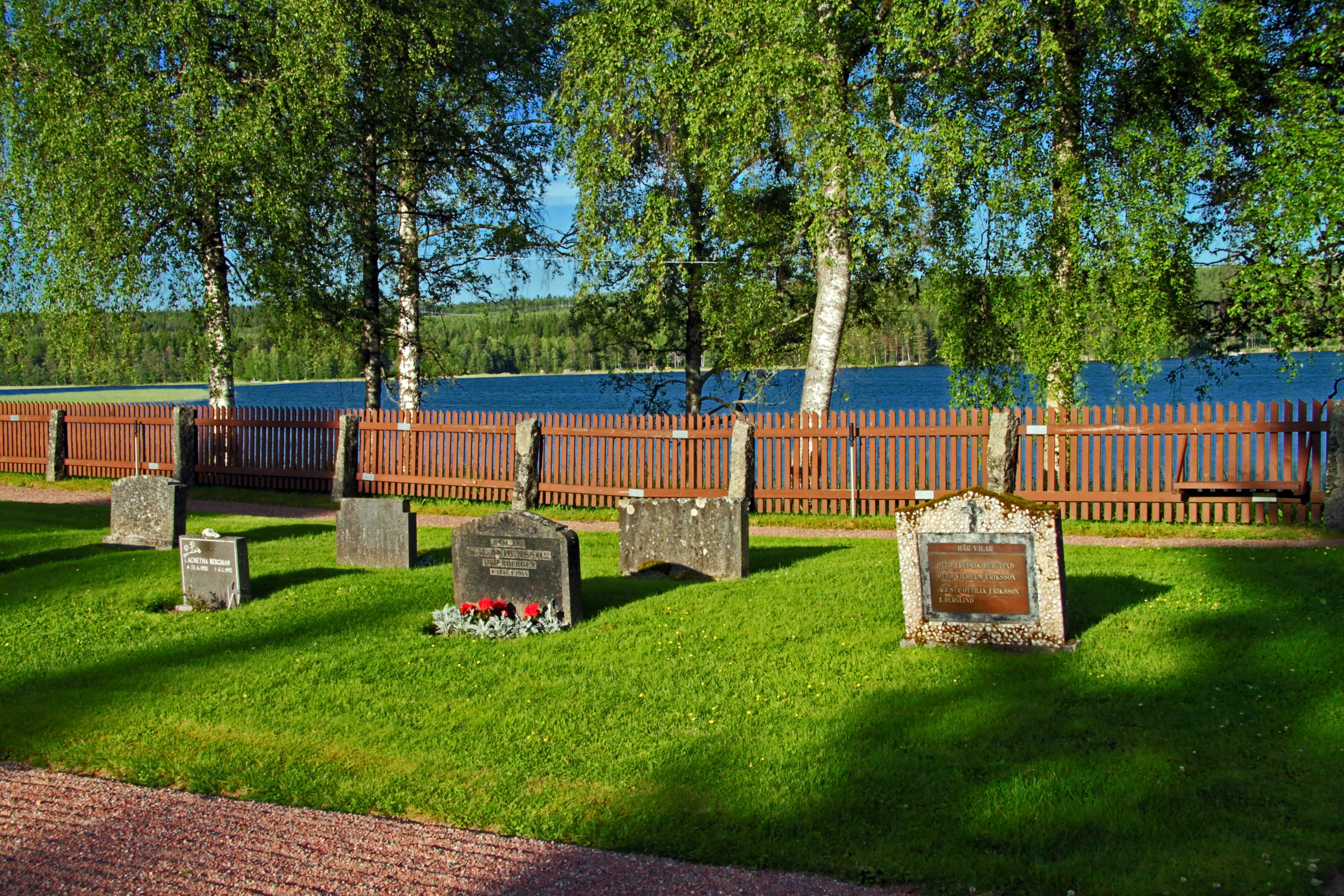 Borlänge V, Sweden